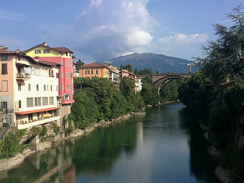 Ponte San Pietro - Fiume Brembo